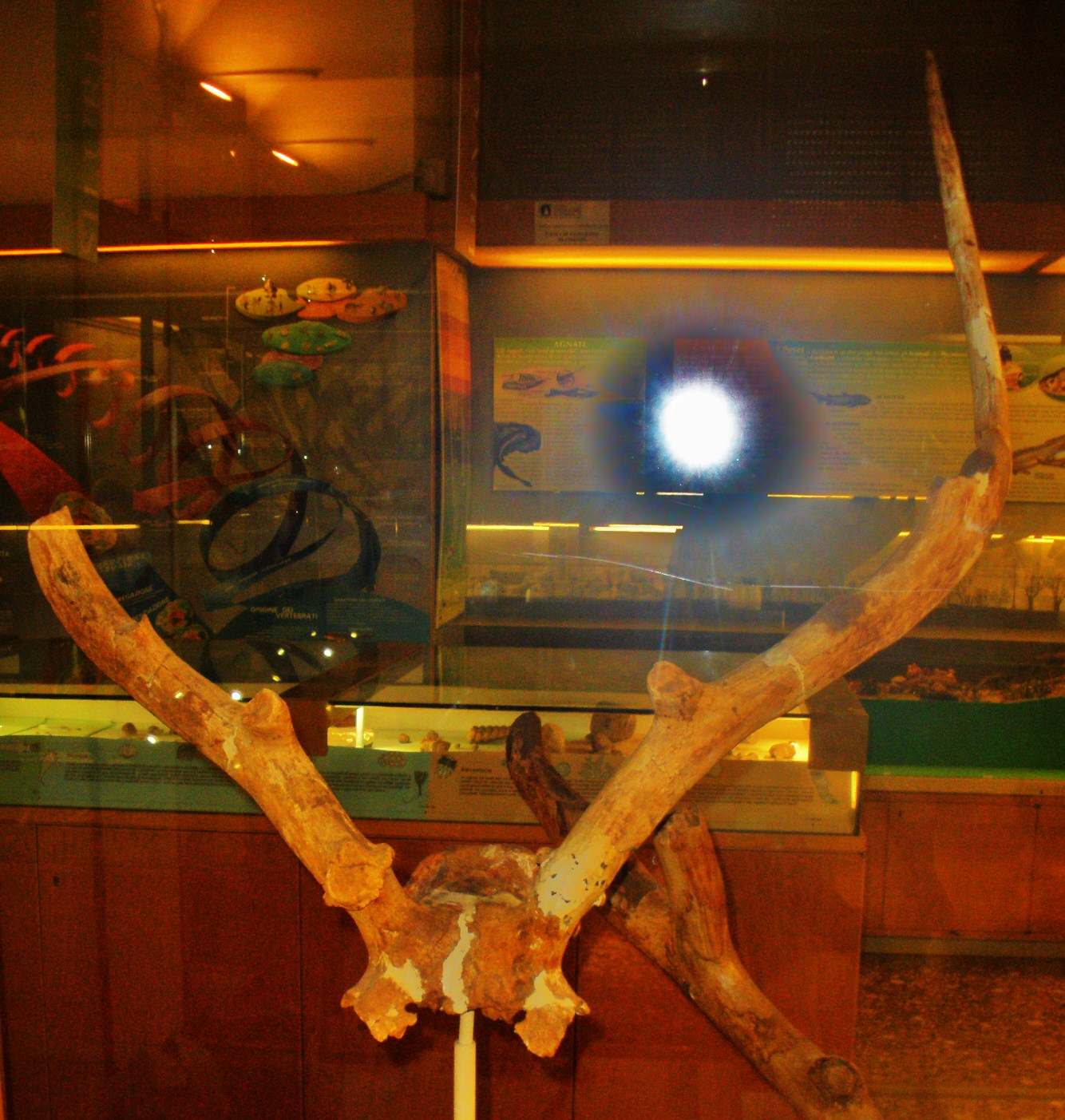 Fossil of Eucladoceros, an extinct mammal - Took the picture at Museo di Paleontologia di Firenze